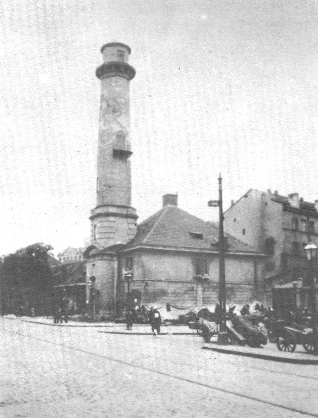 Dawne Koszary Mirowskie. IV Odział Straży Pożarnej przy ul. Chłodnej 3